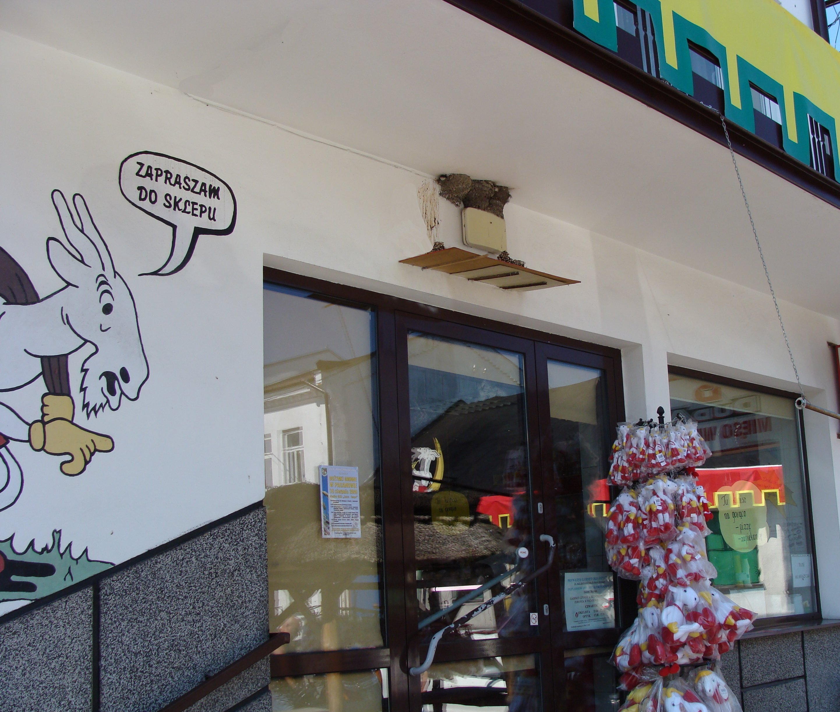 Koziołek Matołek w Pacanowie